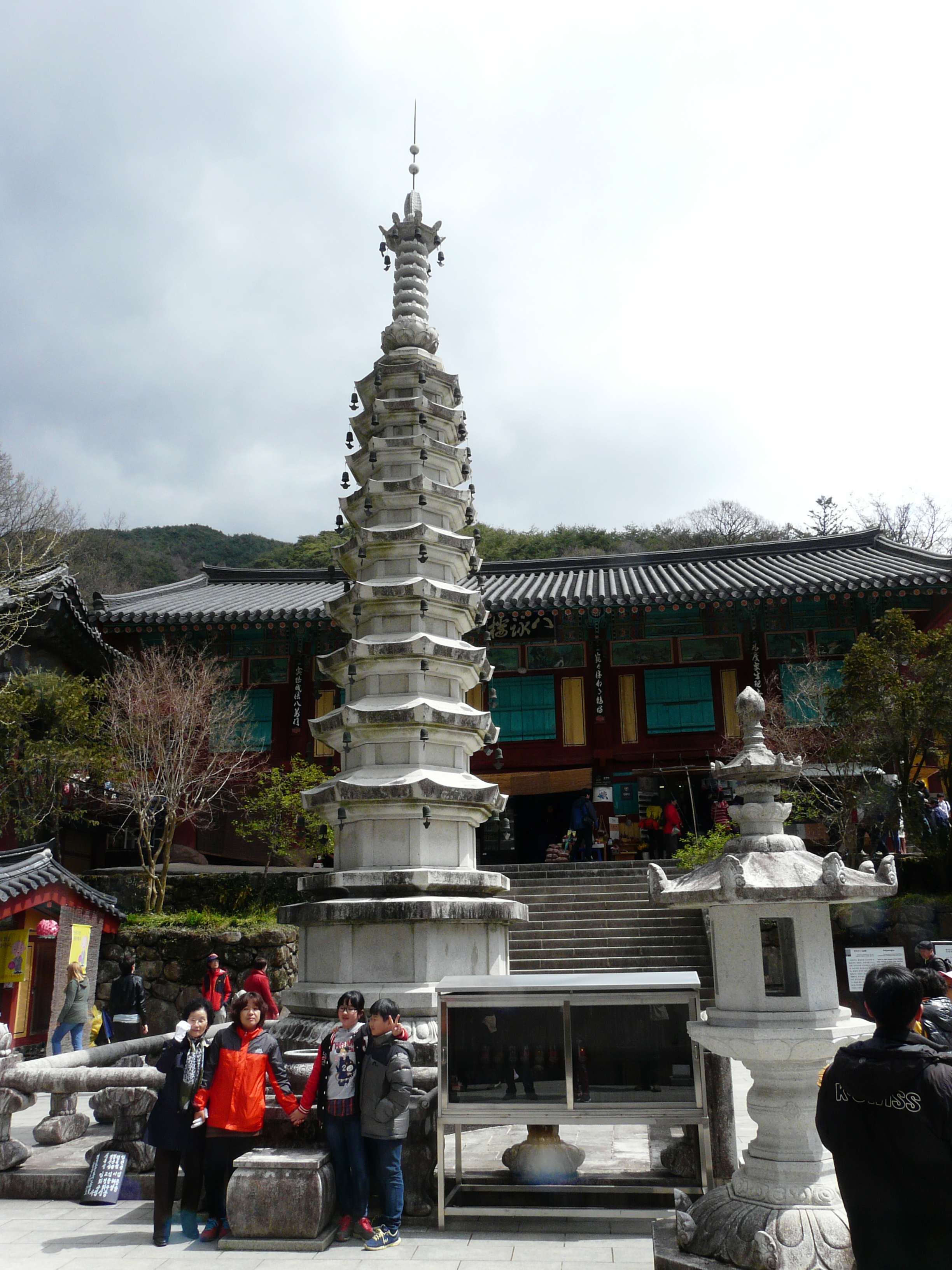 Ssanggyesa temple (쌍계사)